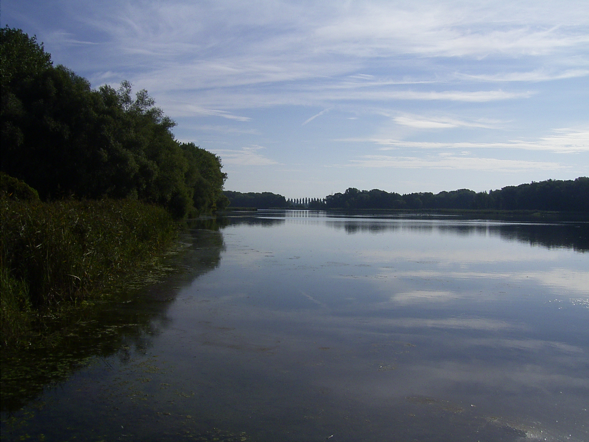 Morgenidylle im Naturschutzgebiet Cösitzer Teich